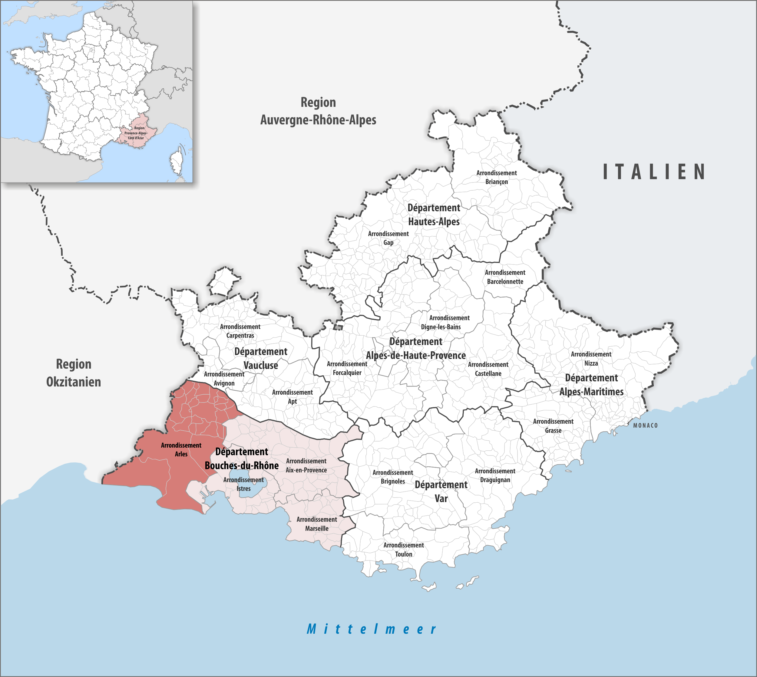 Lage des Arrondissements Arles